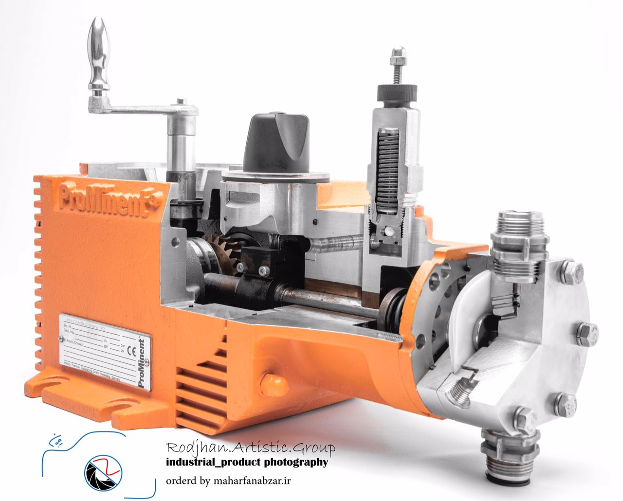 در این تصویر شماتیک قرار گیری قطعات و ساختار دوزینگ پمپ یا پمپ تزریق مواد شیمیایی به نمایش در آمده